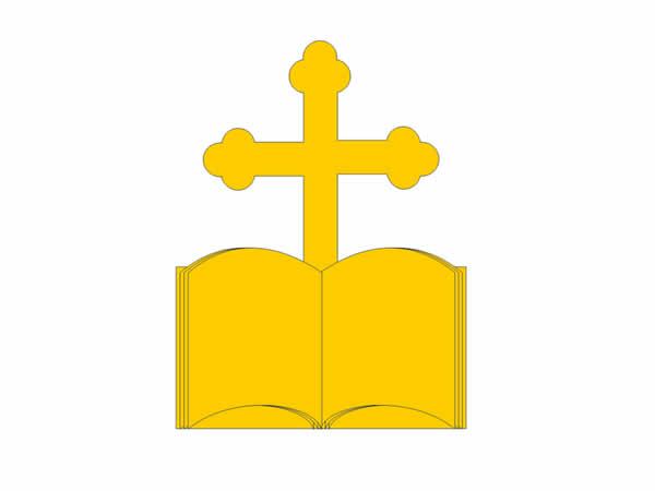 Serviço de Assistência Religiosa